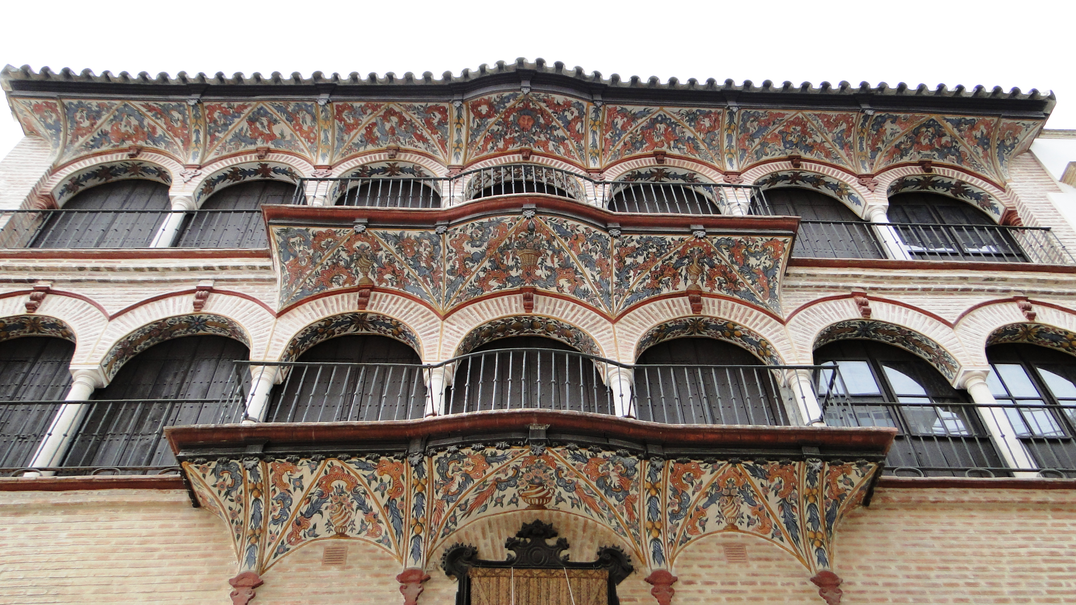 Ecija (Sevilla) - Casa del Gremio de la Seda